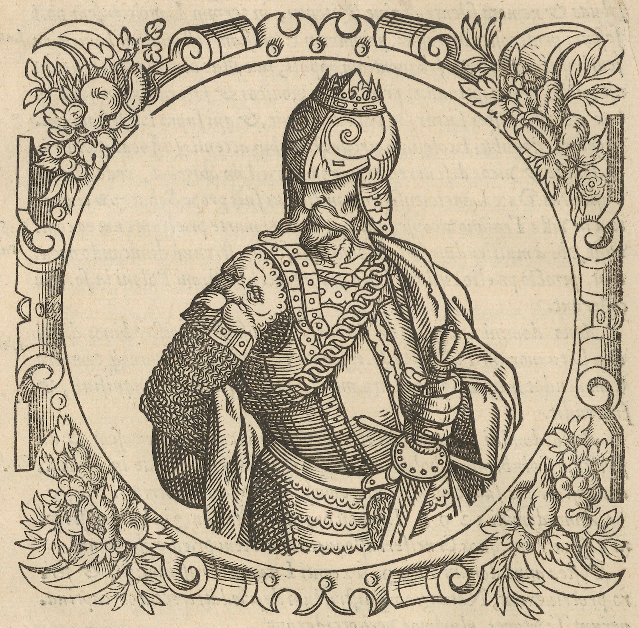 Беларуская (тарашкевіца): Уяўны партрэт вялікага князя Гедзіміна (Giedzimin)